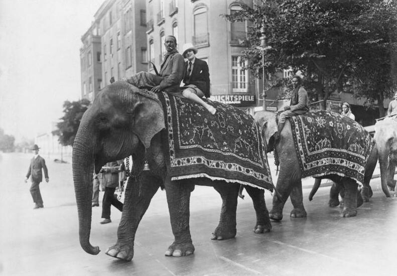 Indien in Berlin! Die weltbekannte Hagenbeck-Schau hat ihren Einzug in Berlin gehalten, um sich im Zoologischen Garten dem Berliner Publikum vorzustellen. Der Einzug der Elefanten durch die Strassen Berlins.